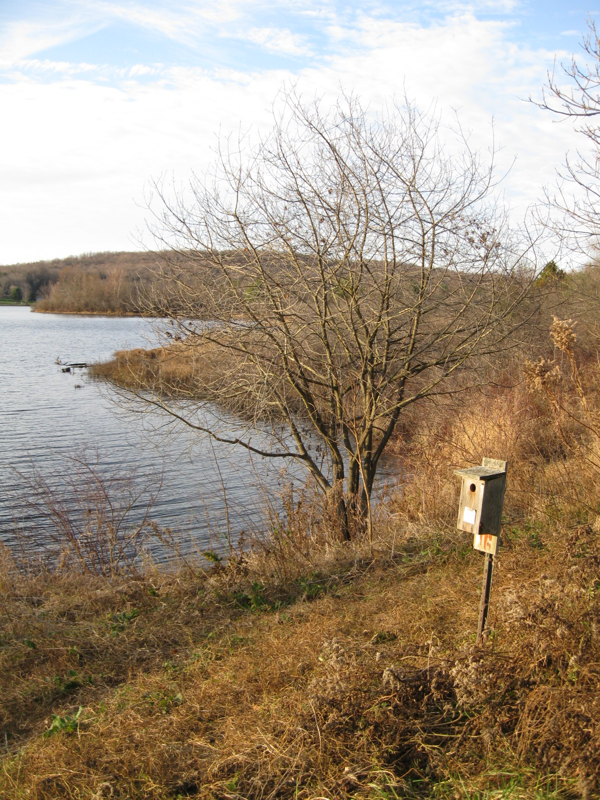 Lackawanna State Park - Pennsylvania